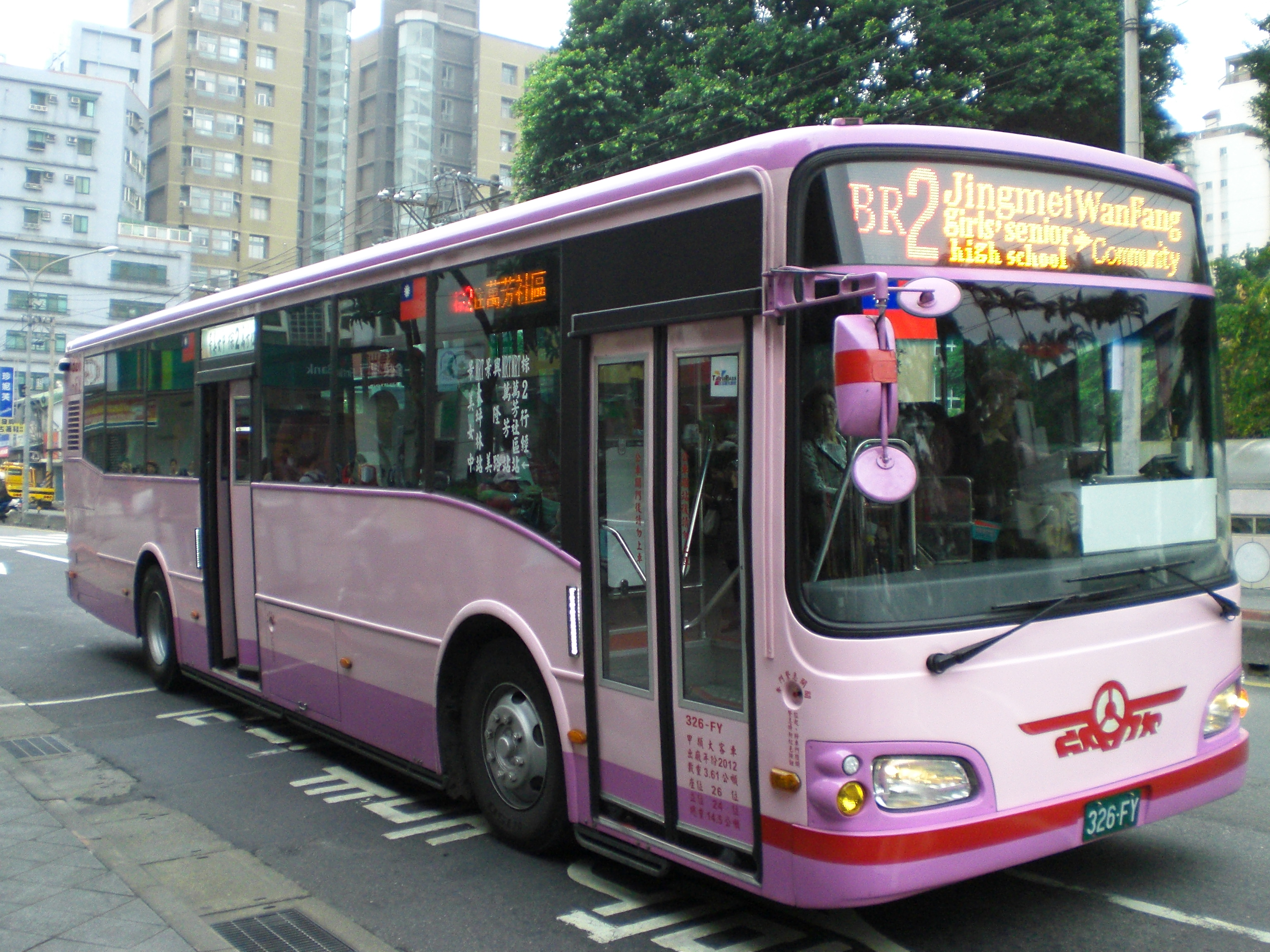 欣欣客運2012年大客車326-FY右前方外觀